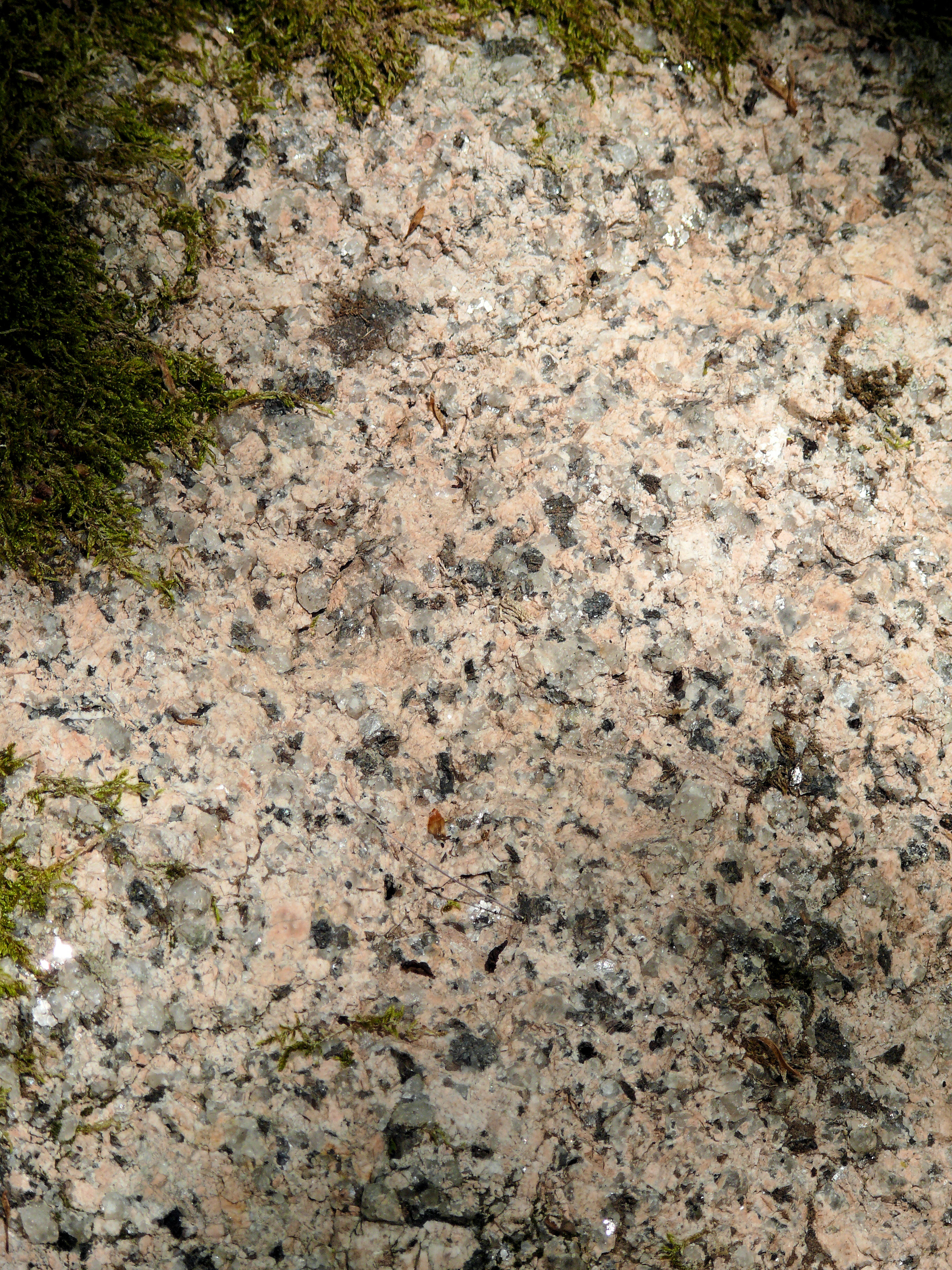 Pierres jaumâtres - Structure d'une pierre